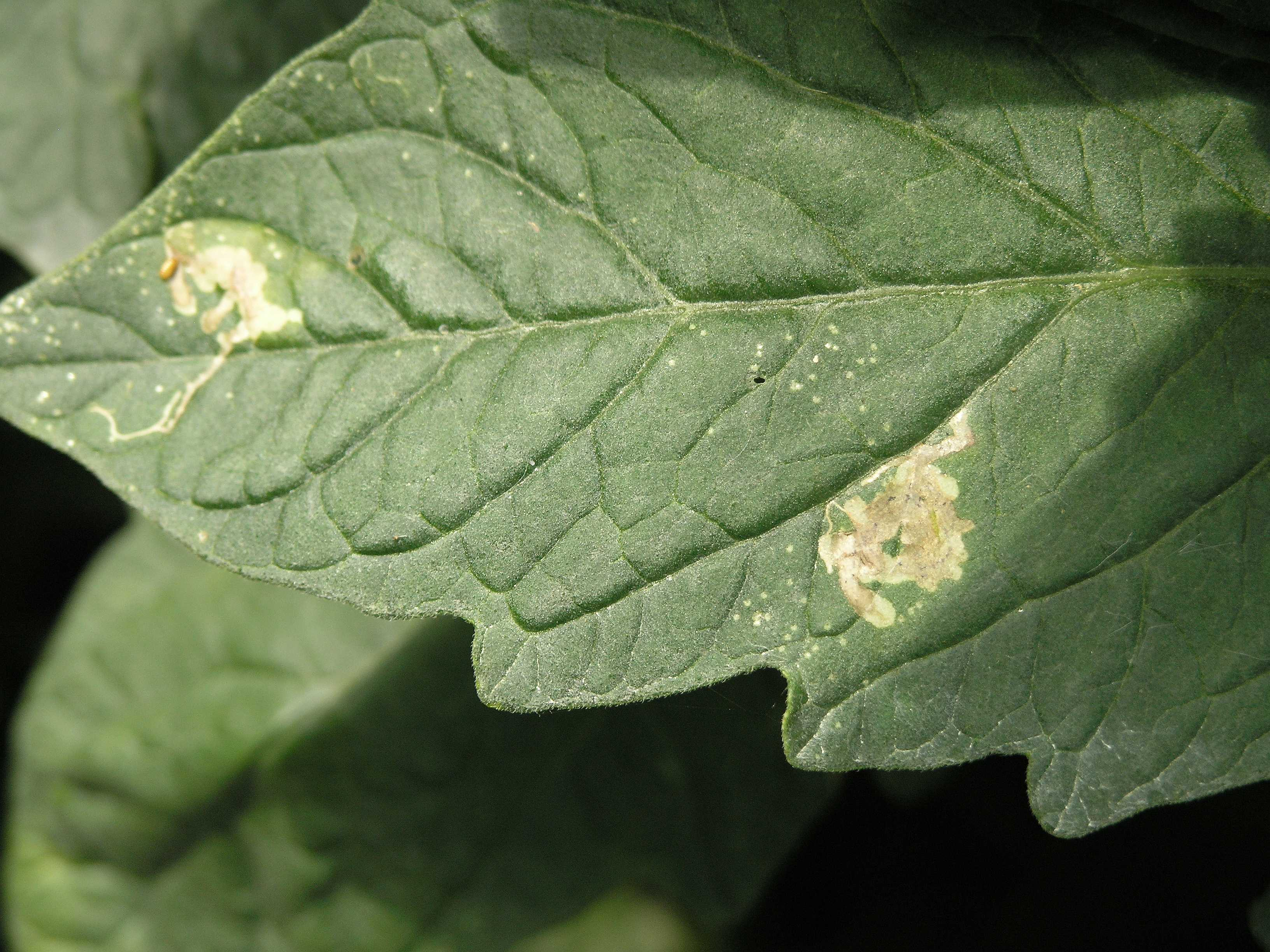 Tomate Blatt Minierfliegen-Fraßgänge